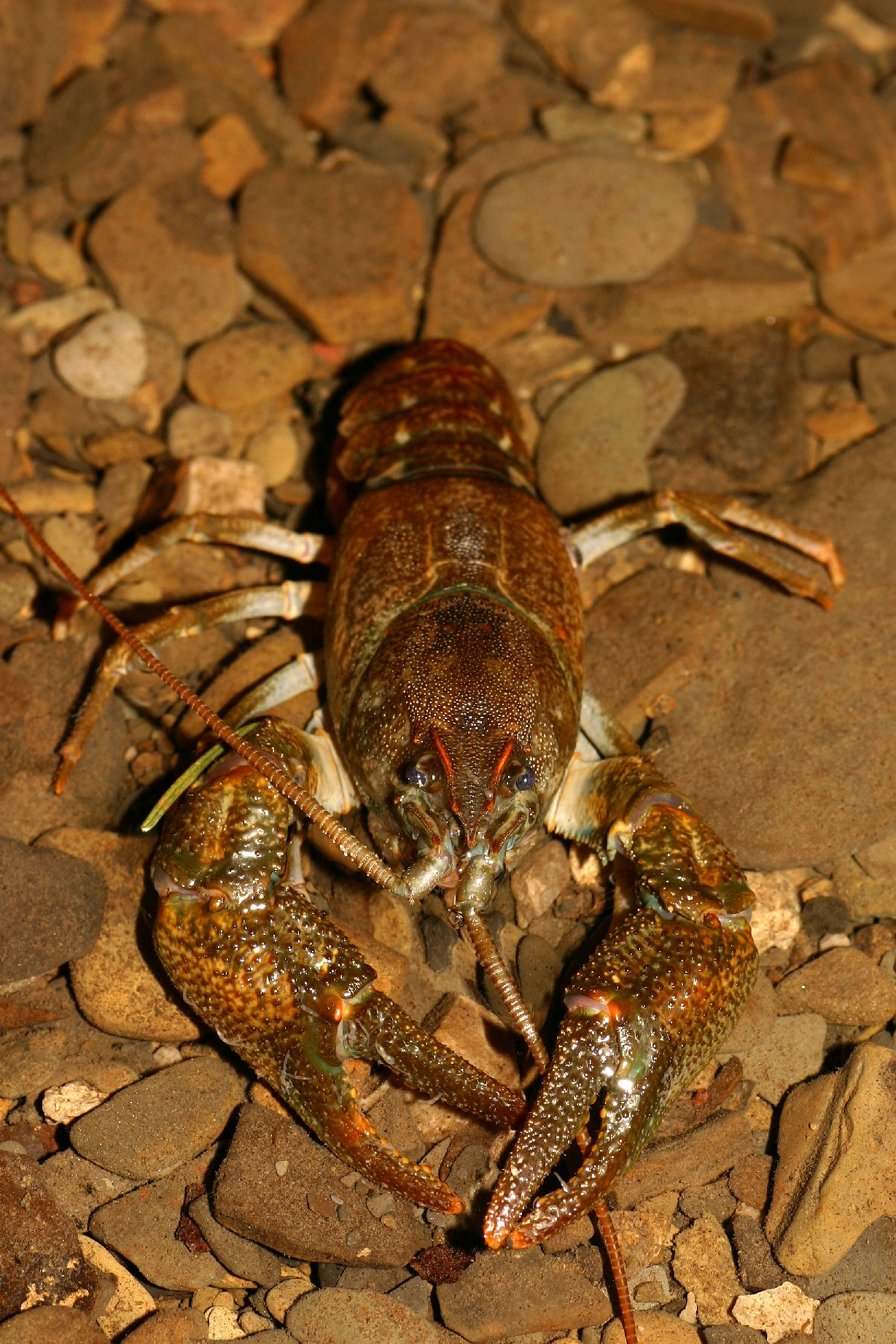 Steinkrebs (Austropotamobius torrentium). Fotografiert und gefunden im Münichbach (Niederösterreich) in der Nähe von Gruberau. en: crayfish (Austropotamobius torrentium). Photographed and found inside the Münichbach creek near Gruberau (Lower Austria).